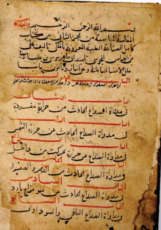 صفحة من مخطوط المقالة الثانية من كتاب كامل الصناعة الطبية